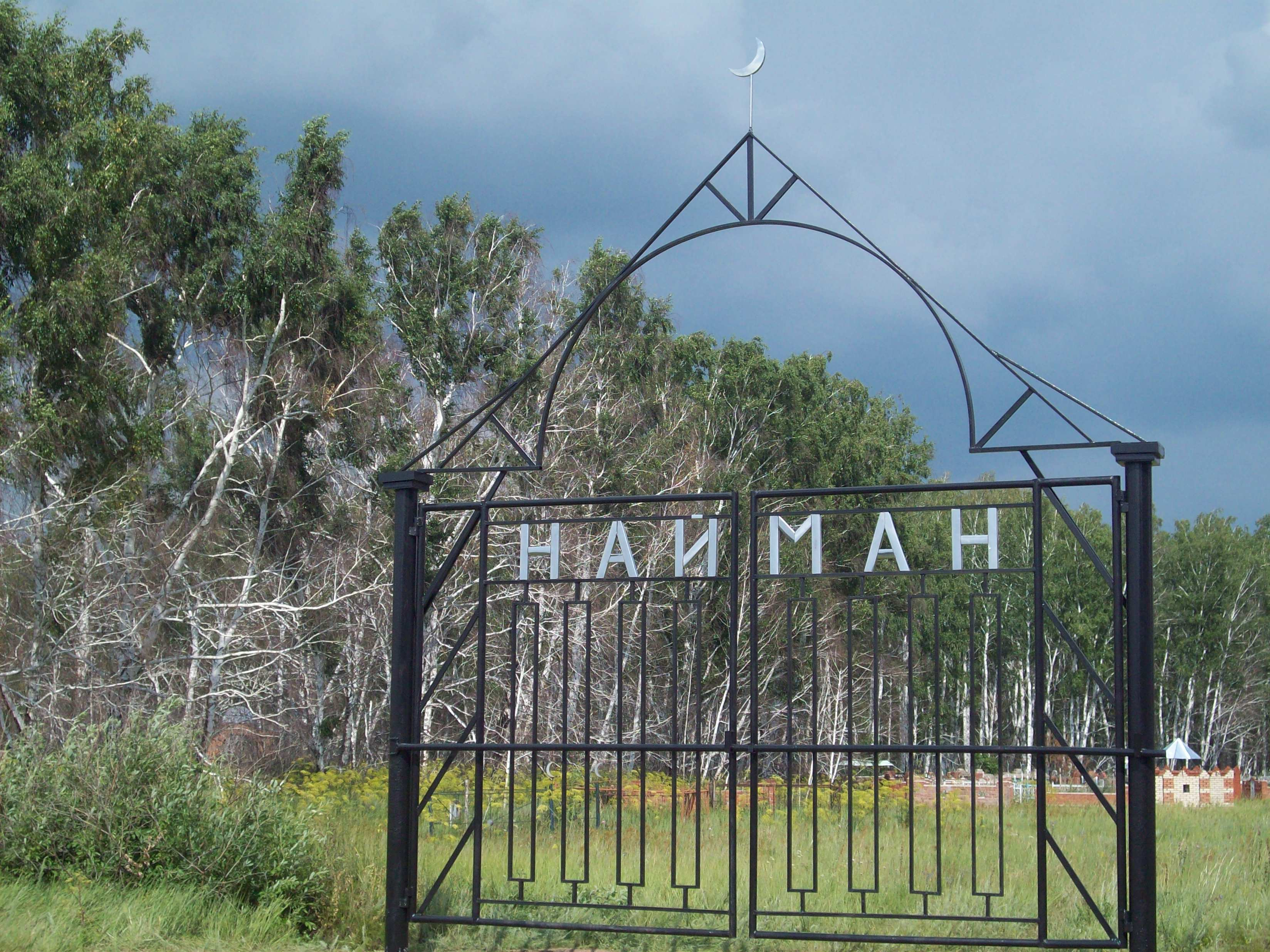 Найман аулының елдің зираты